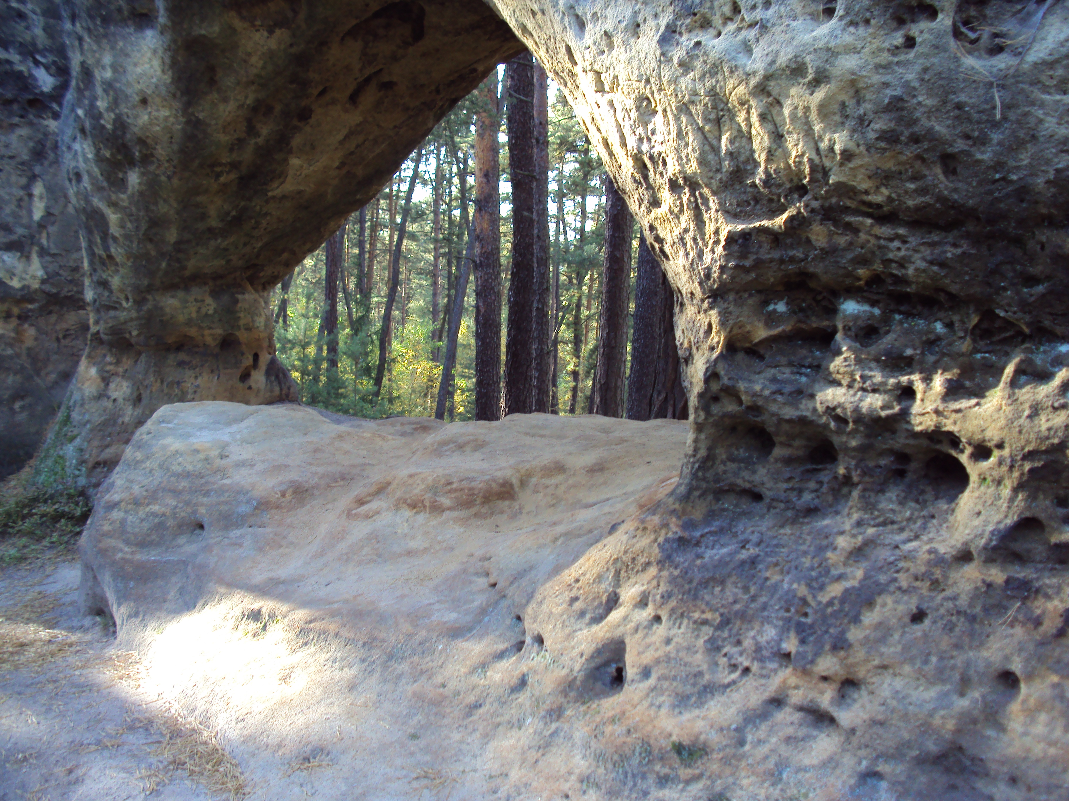 Přírodní památka Divadlo, asi 4 km JV od Hamr na Jezeře